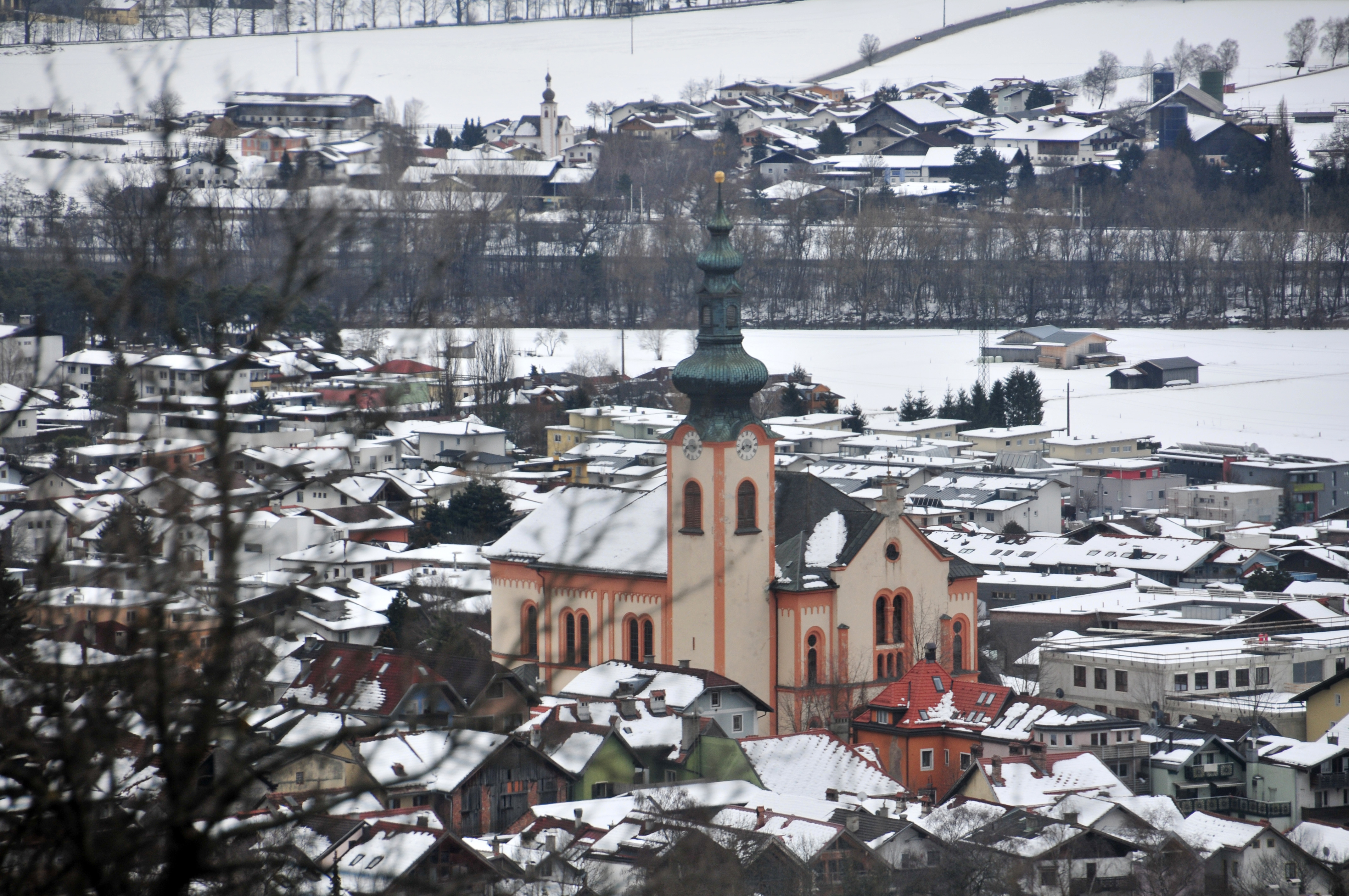 Zirl mit Pfarrkirche. Erste Olympische Jugend- Winterspiele 201213. bis 22. Jänner in Innsbruck Dieses Foto wurde durch die Unterstützung von Wikimedia Österreich und die Twoonix Software GmbH ermöglicht.